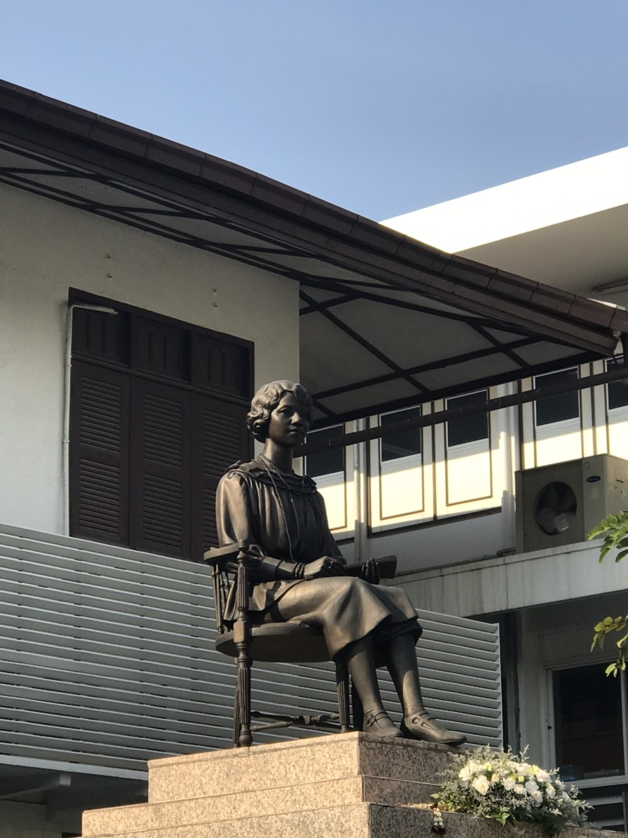 ผลงานประติมากรรมของ อาจารย์ ไข่มุกต์ ชูโต ณ โรงเรีบนราชินีบน